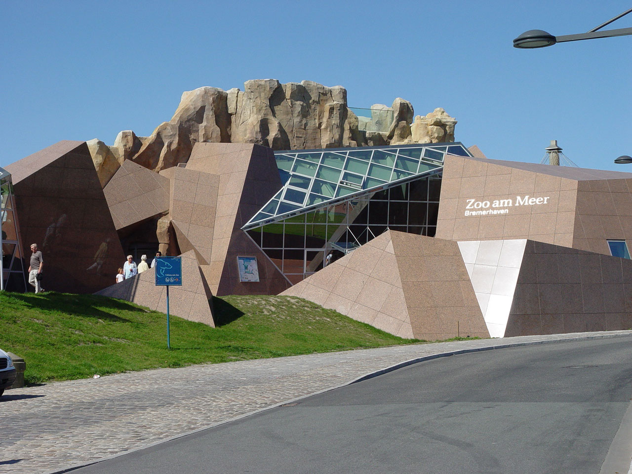 Eingang des Zoo am Meer in Bremerhaven